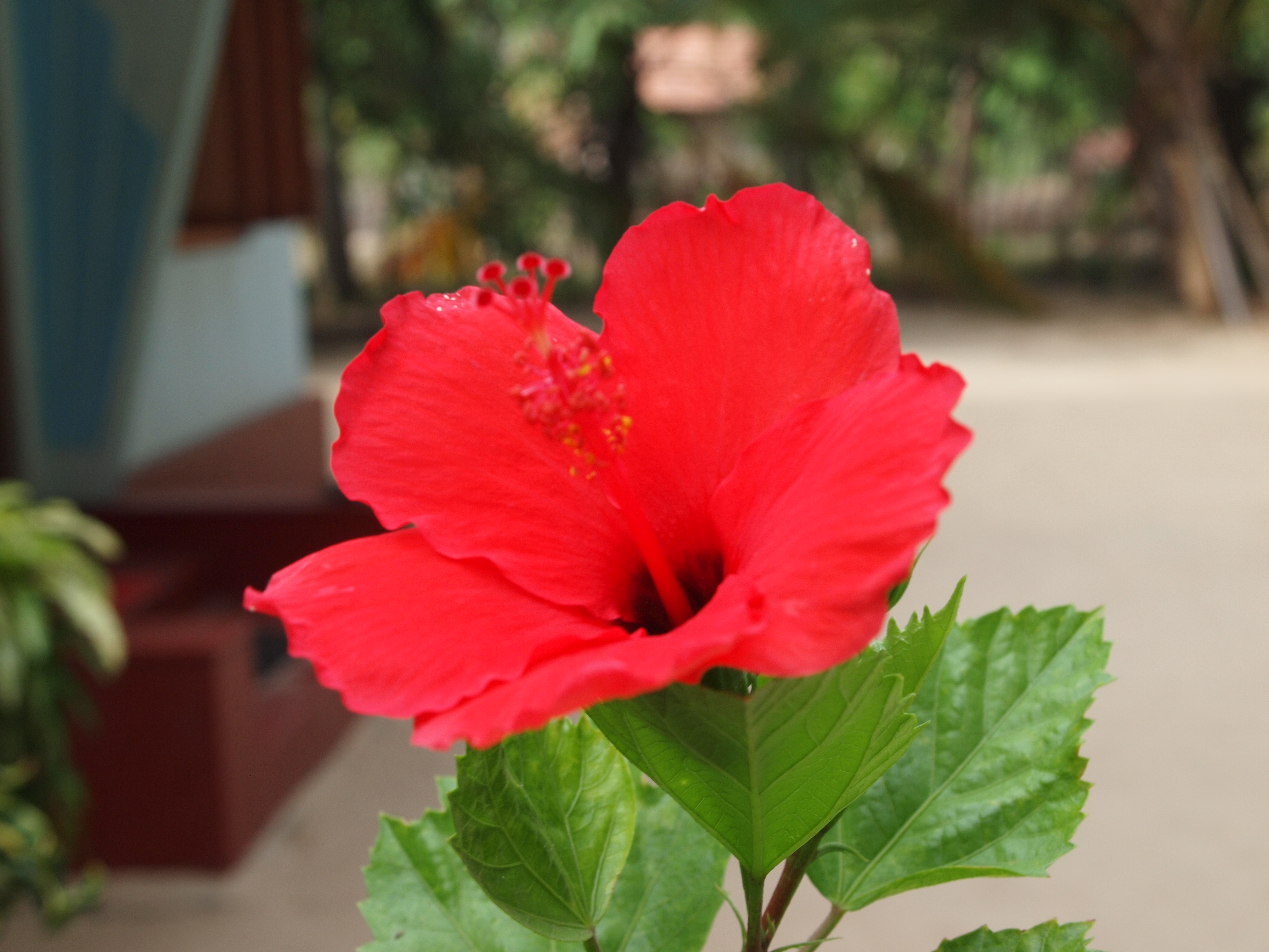 செம்பருத்தி அல்லது செவ்வரத்தை பூ